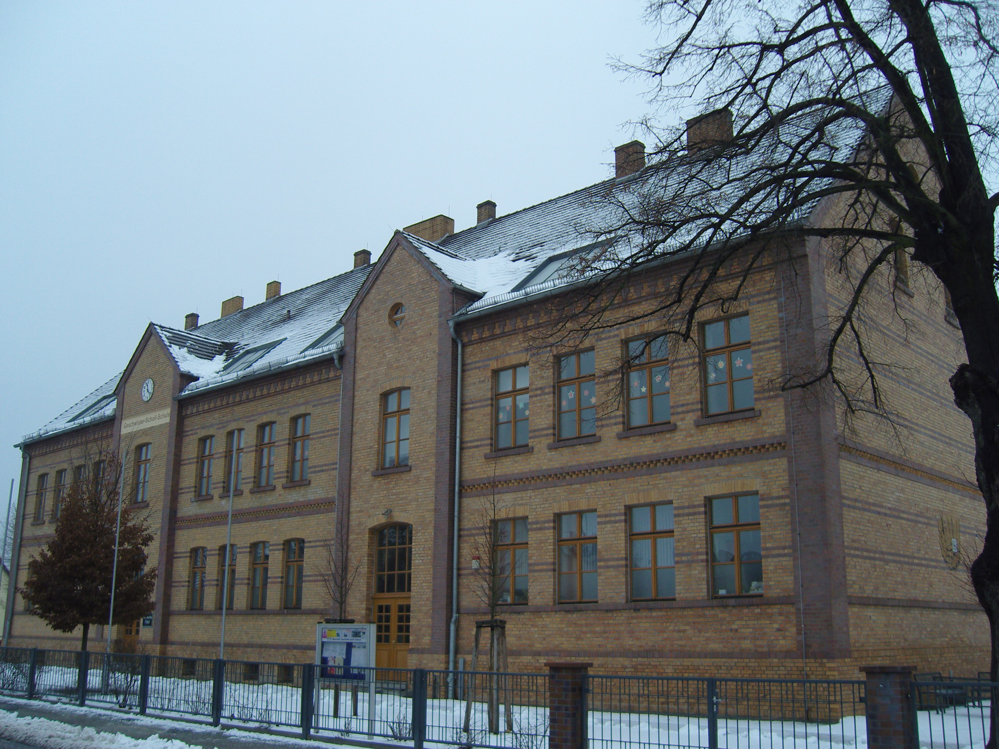 Haus in der Dresdner Straße 9 in Ruhland (Baudenkmal), Geschwister-Scholl-Schule; links davor die "Einheits-Hainbuche"